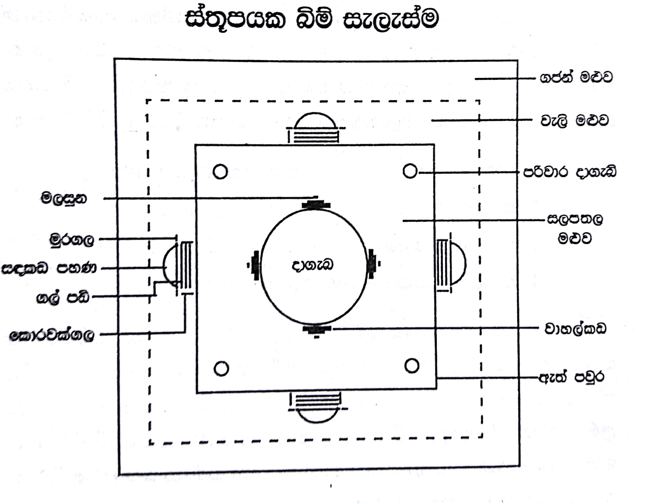 සිංහල: ස්තූපයක බිම් සැලැස්ම